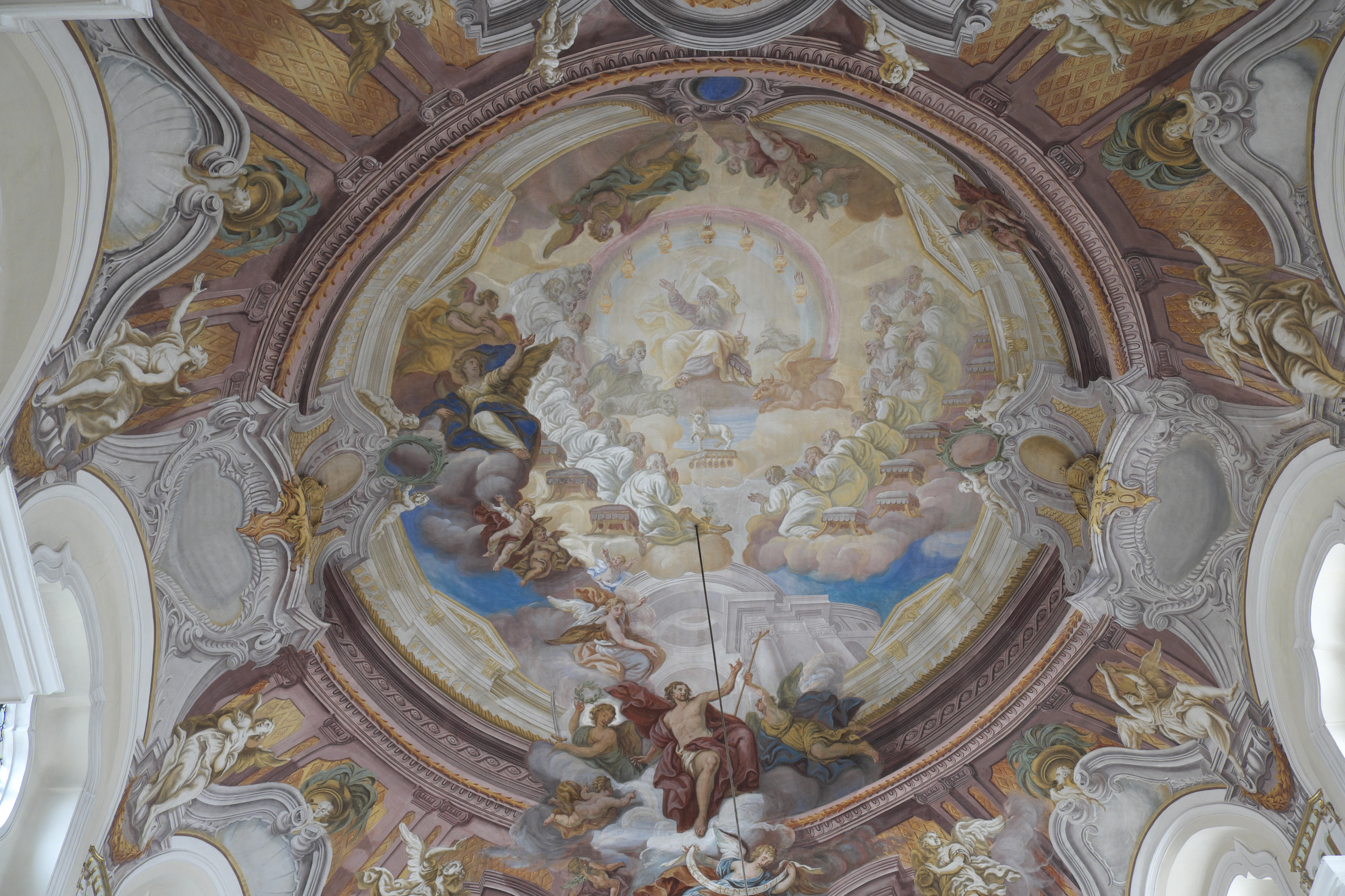 Katholische Pfarrkirche St. Johannes Baptist in Dischingen (Landkreis Heidenheim/Baden-Württemberg), Chorfresko von Gabriel P. Lucello, von 1771, Darstellung: Lamm Gottes